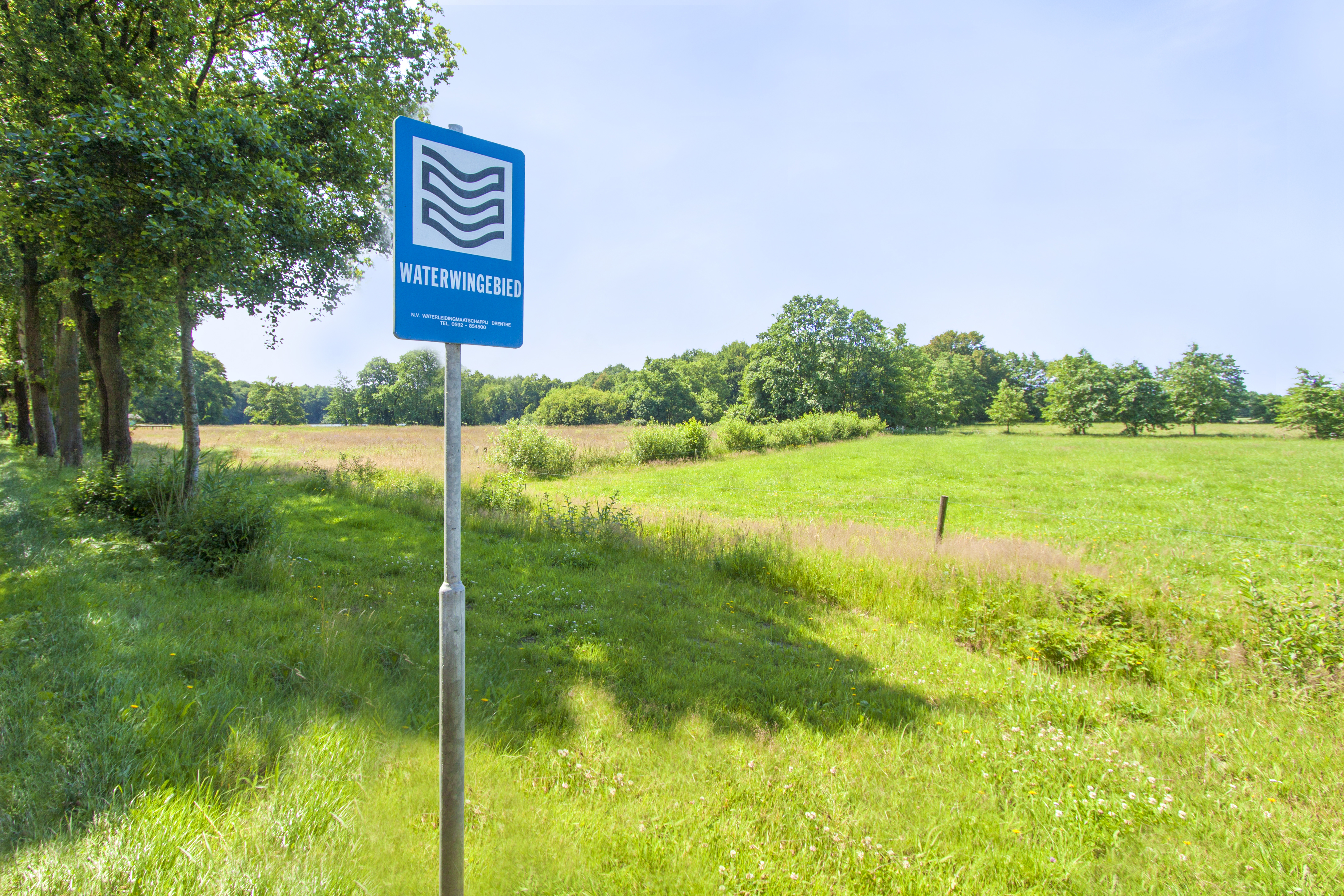 Waterwingebied